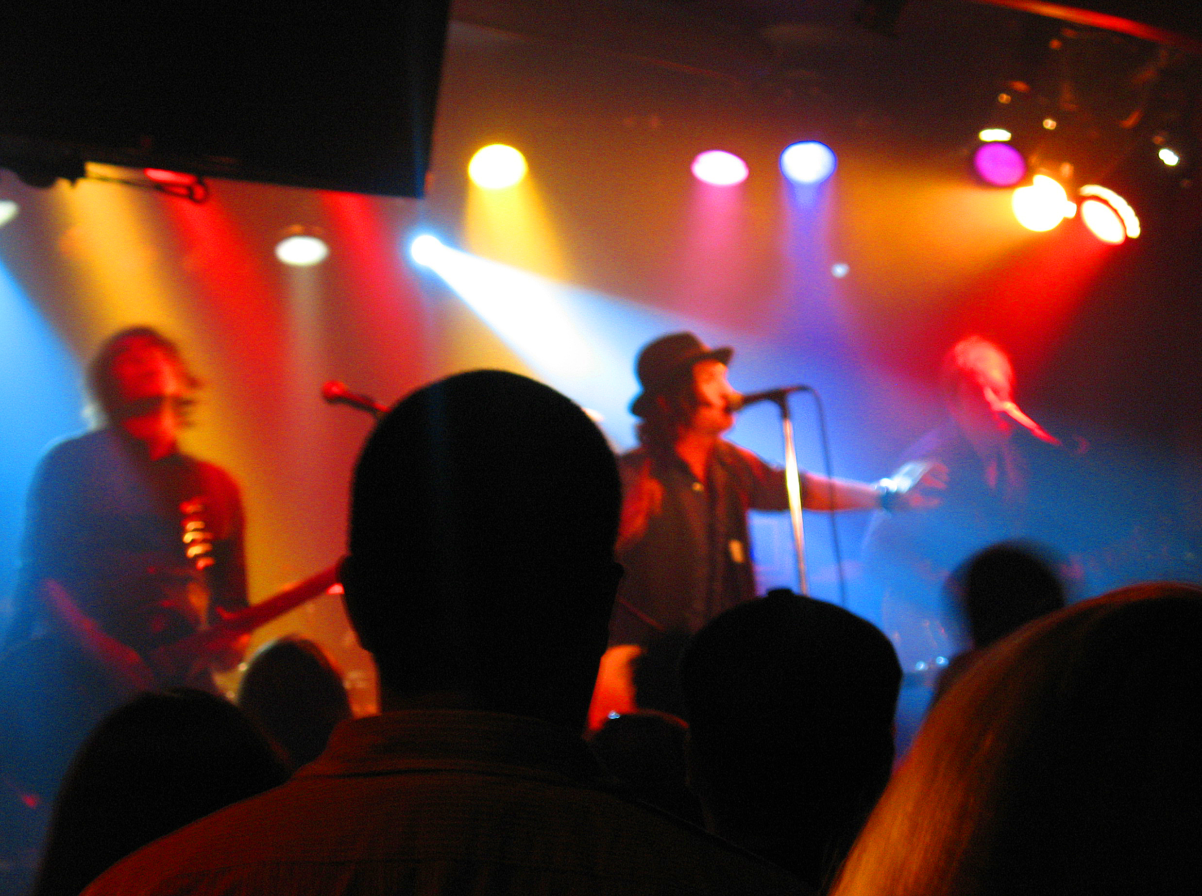 Flickerstick-Viper-Room-LA